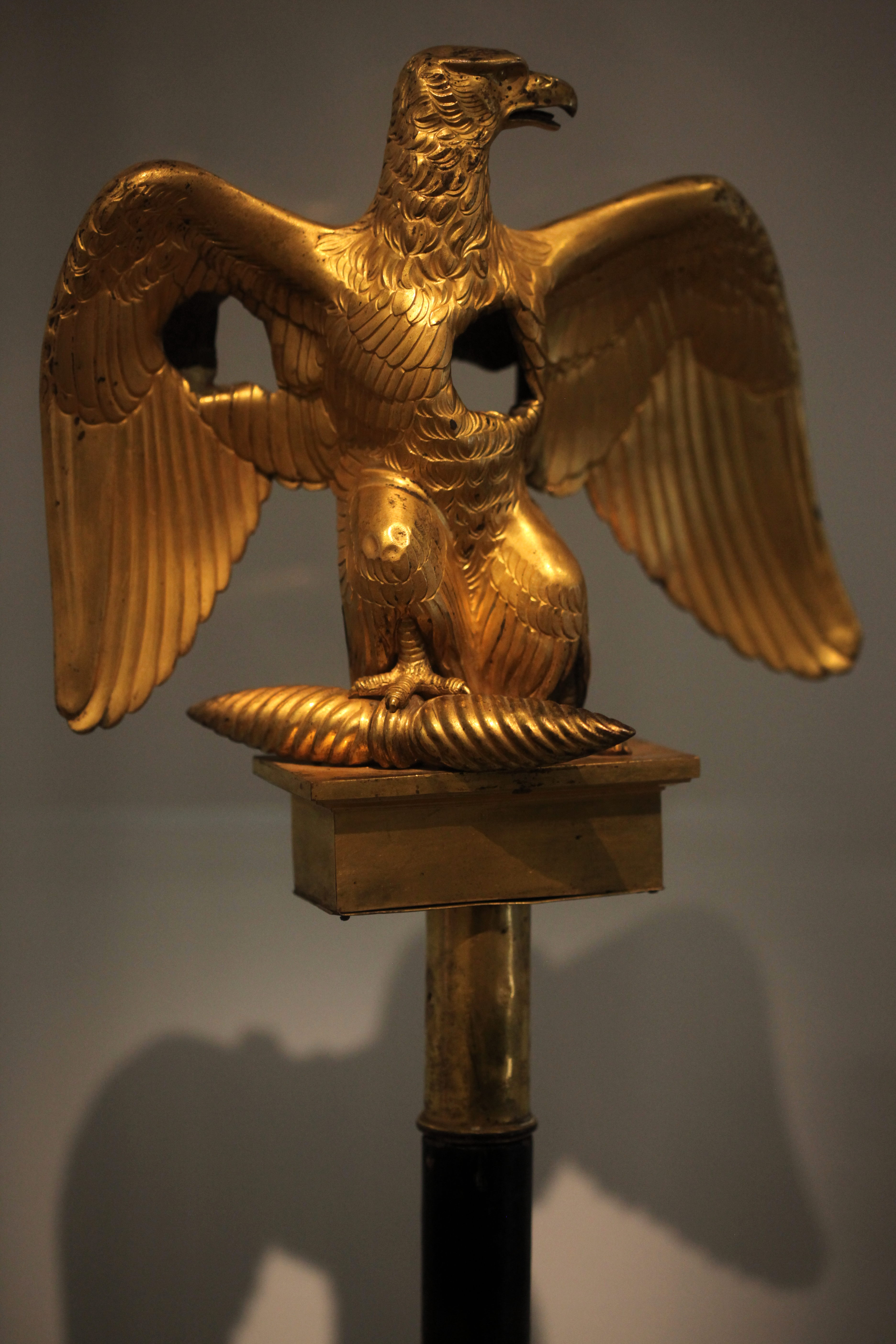 Napoleonic eagle damaged by projectiles, known as "wounded" eagle (fr: aigle blessée). 1811 pattern designed by Pierre-Philippe Thomire, electroplating goldened copper. Musée de l'Armée.